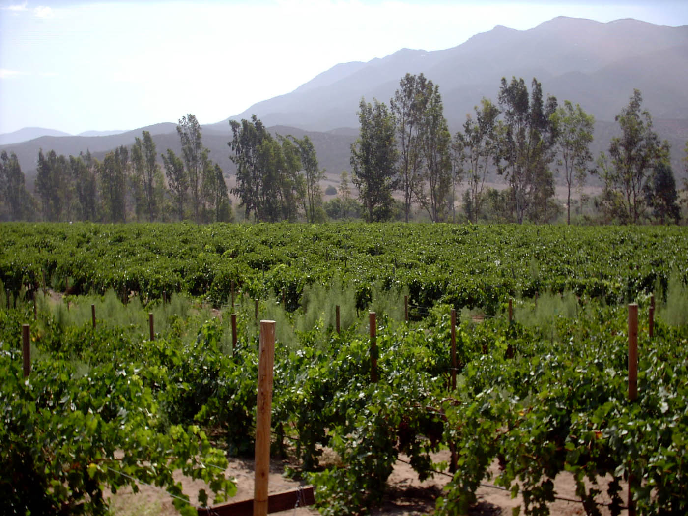 Rand eines Weinfeld in Baja California